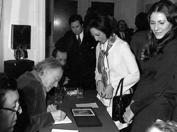 Paul Delvaux en séance de dédicaces, Bruxelles.